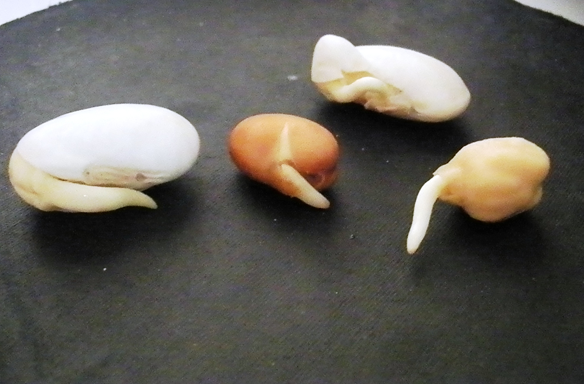 שורשון הזרע שורשון המגיח מזרעי קטניות שונים מיד עם הנביטה